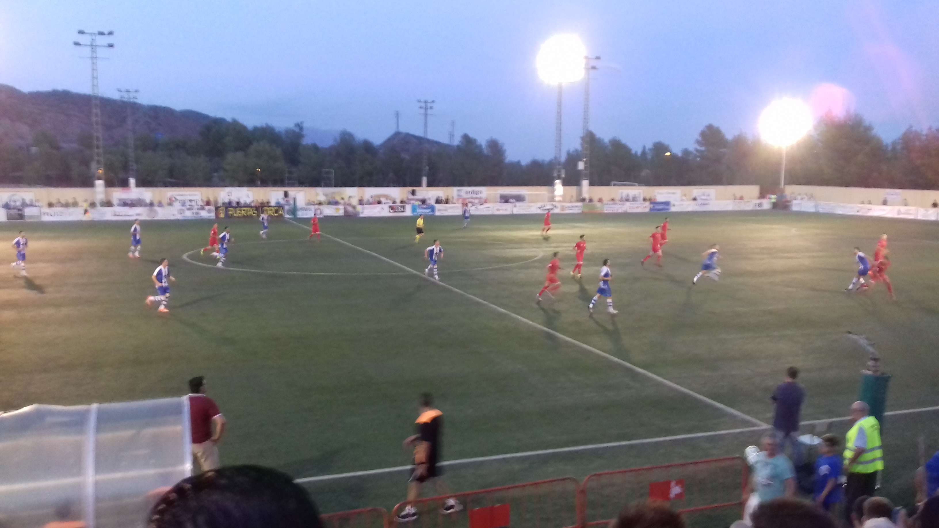 CF Lorca Deportiva - La Hoya Lorca CF (31-08-2016)